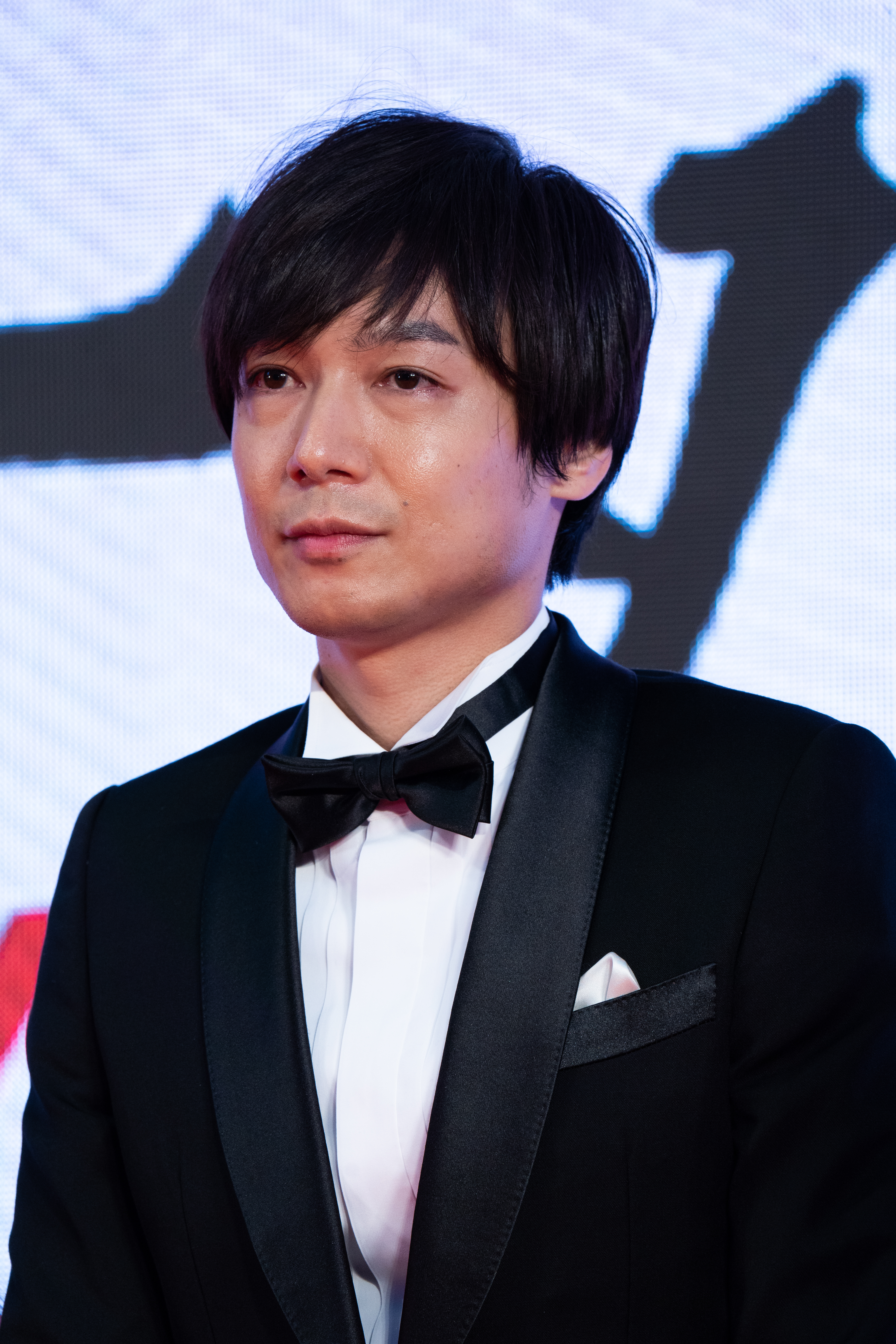 第32回 東京国際映画祭 オープニングセレモニー 郭智博 (どうしようもない僕のちっぽけな世界は、)